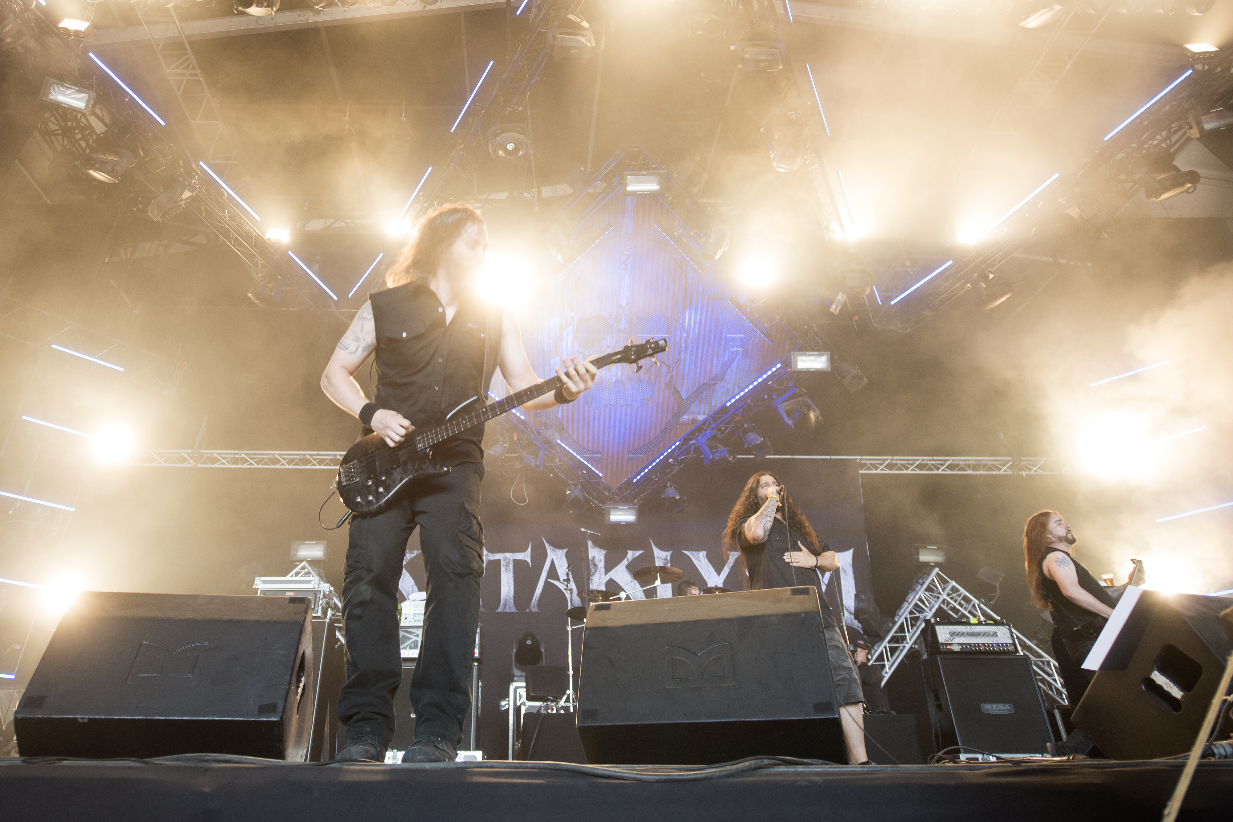 Le groupe canadien Kataklysm, Hellfest 2018.